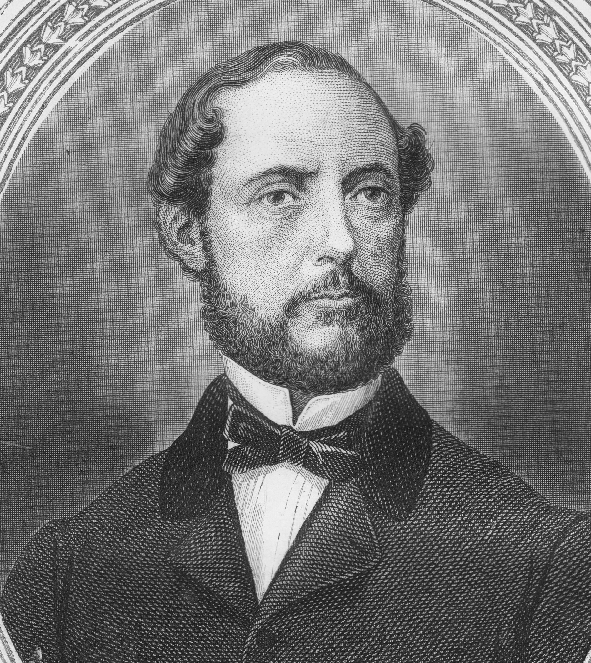 Juan Prim i Prats, general y político español del siglo XIX.